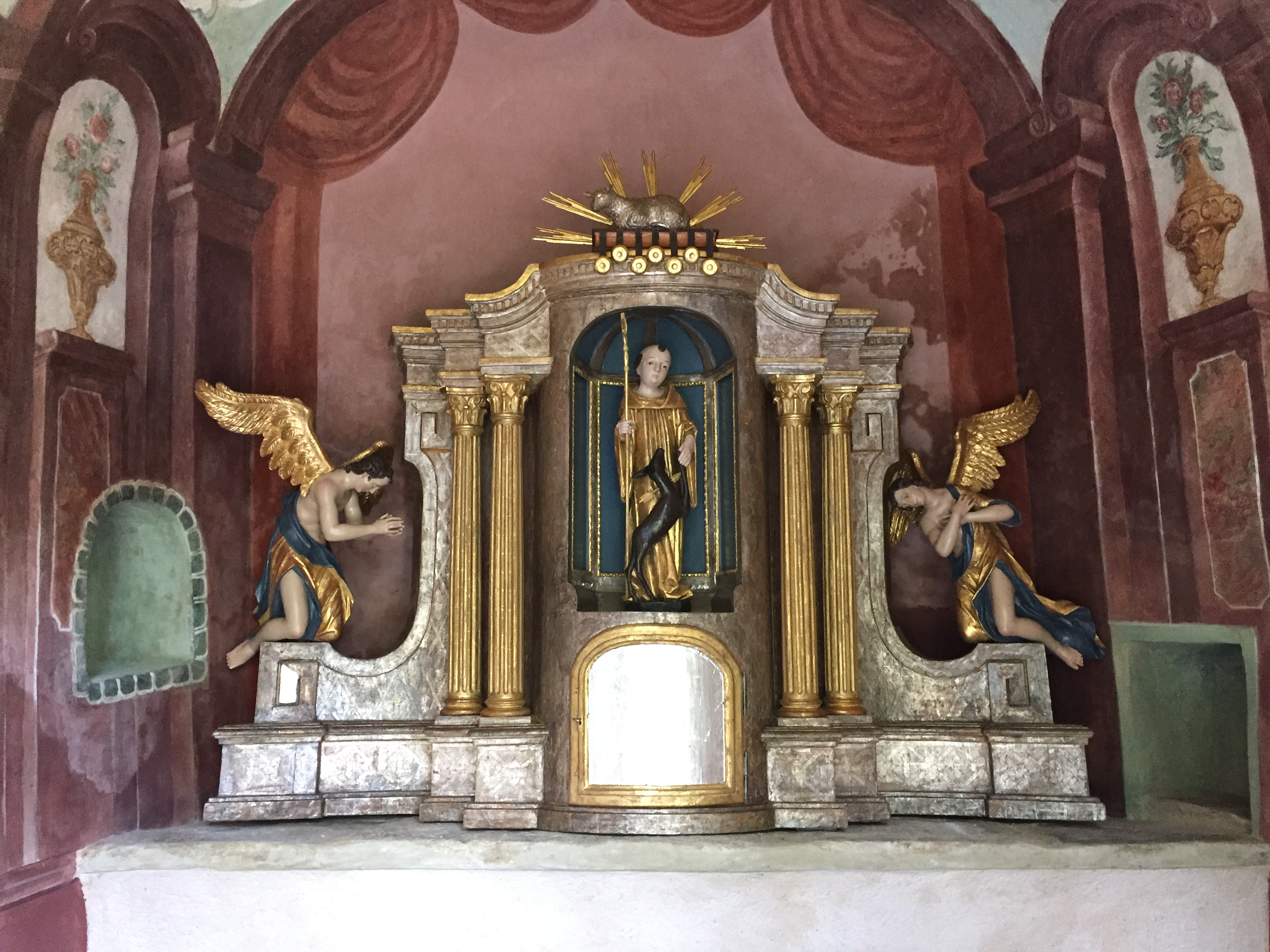 Ägydius(Egidi)-Kapelle, Tabernakel